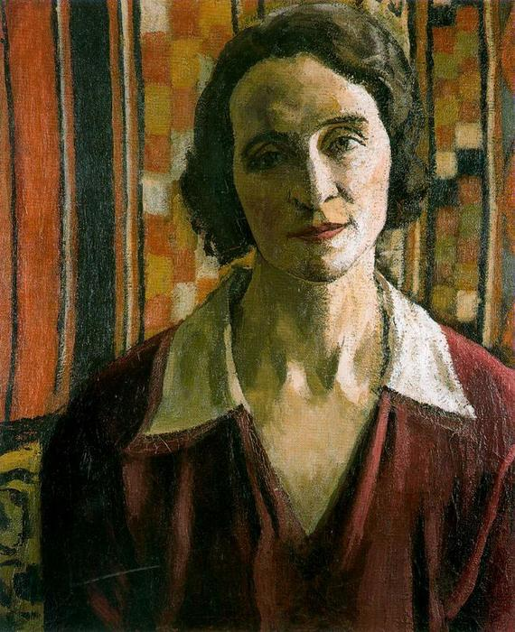 Portrait de Marcelle, l'épouse d'Albert Marquet